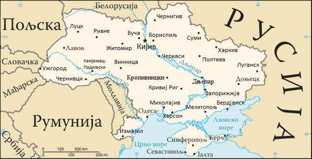 Мапа Украјине